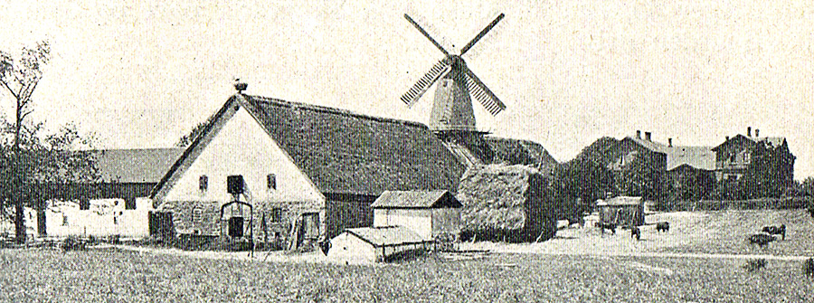 Møllegård er en lille hovedgård, som nævnes første gang i 1575. Gården ligger i Longelse Sogn, Langelands Sønder Herred, Rudkøbing Kommune. Hovedbygningen er opført i 1880.